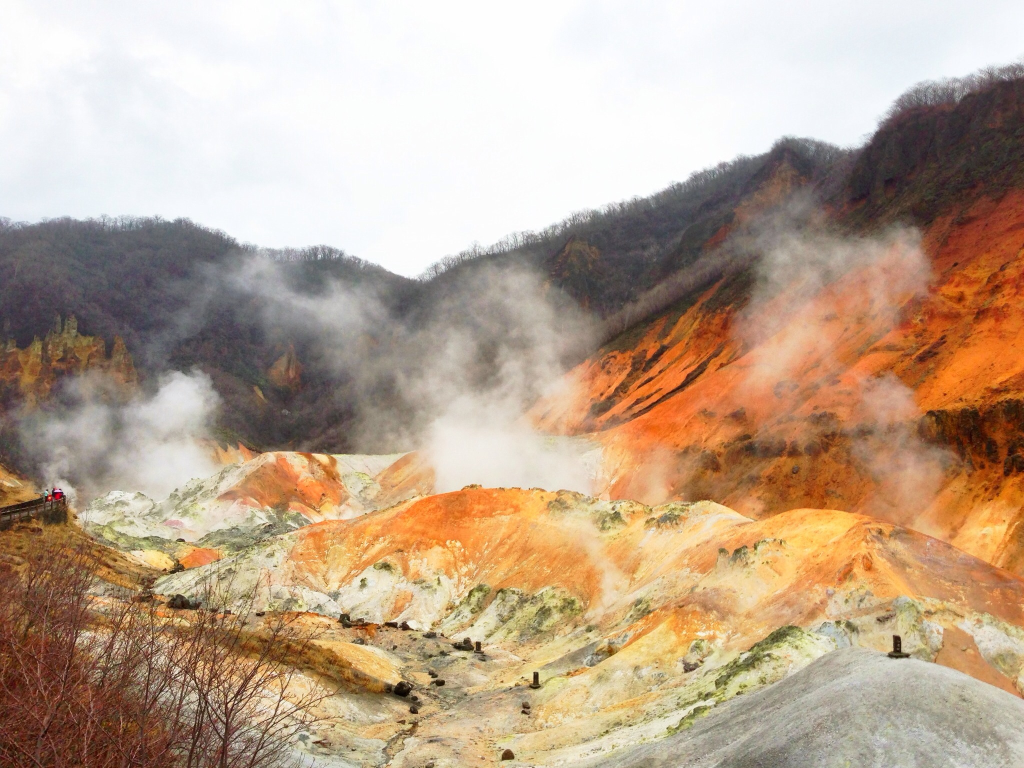 登別温泉の地獄